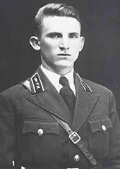 Семён Константинович Куркоткин (1917 — 1990)